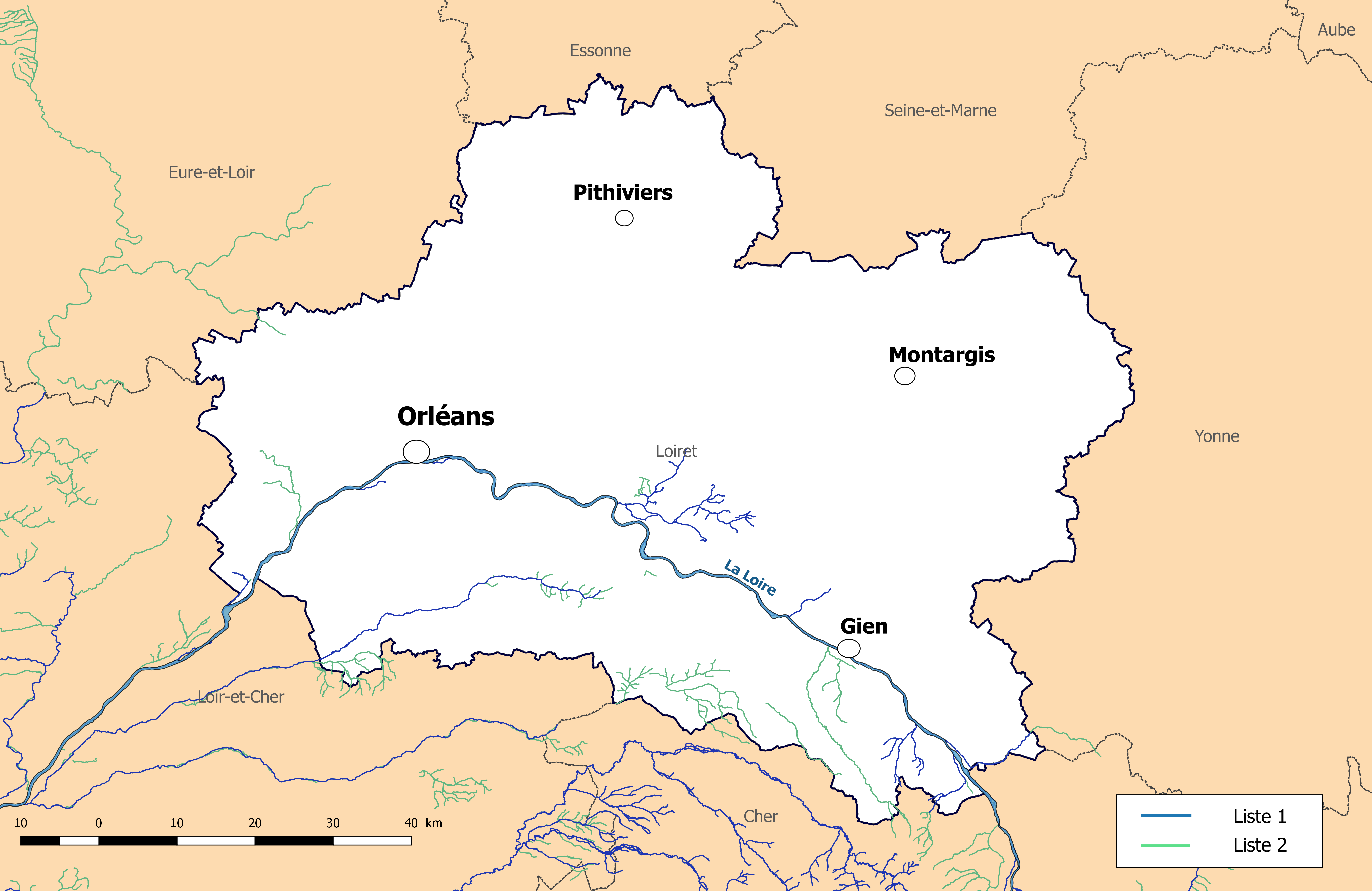 Carte du réseau hydrographique du Loiret (France) avec représentation des cours d'eau classé au titre de l'article L. 214-17 du Code de l’Environnement (continuité écologique).